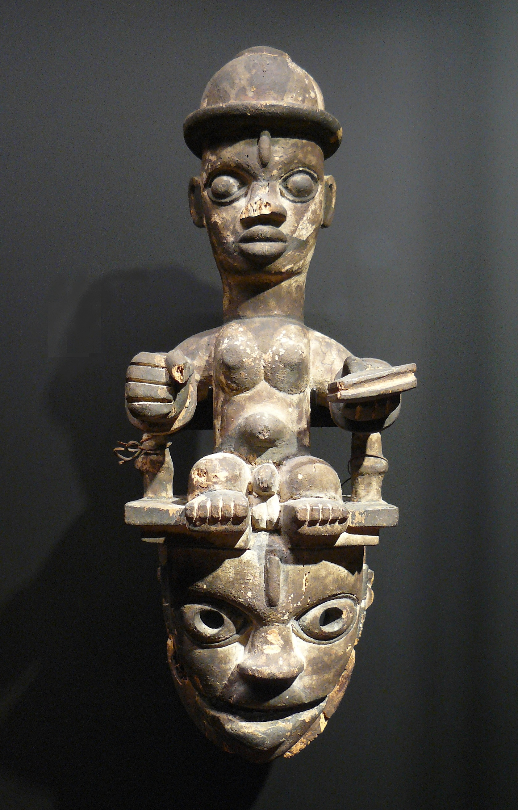 Masque - population Ogoni - Nigéria - 20ème siècle - bois, env. 30 cm - Musée du quai Branly - Paris - n° d'inventaire : 73-1996-1-23